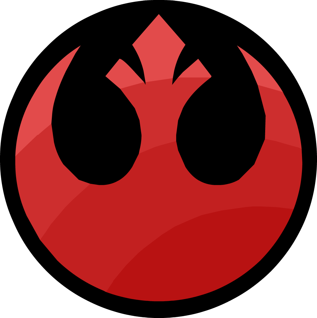 Alianza Rebelde